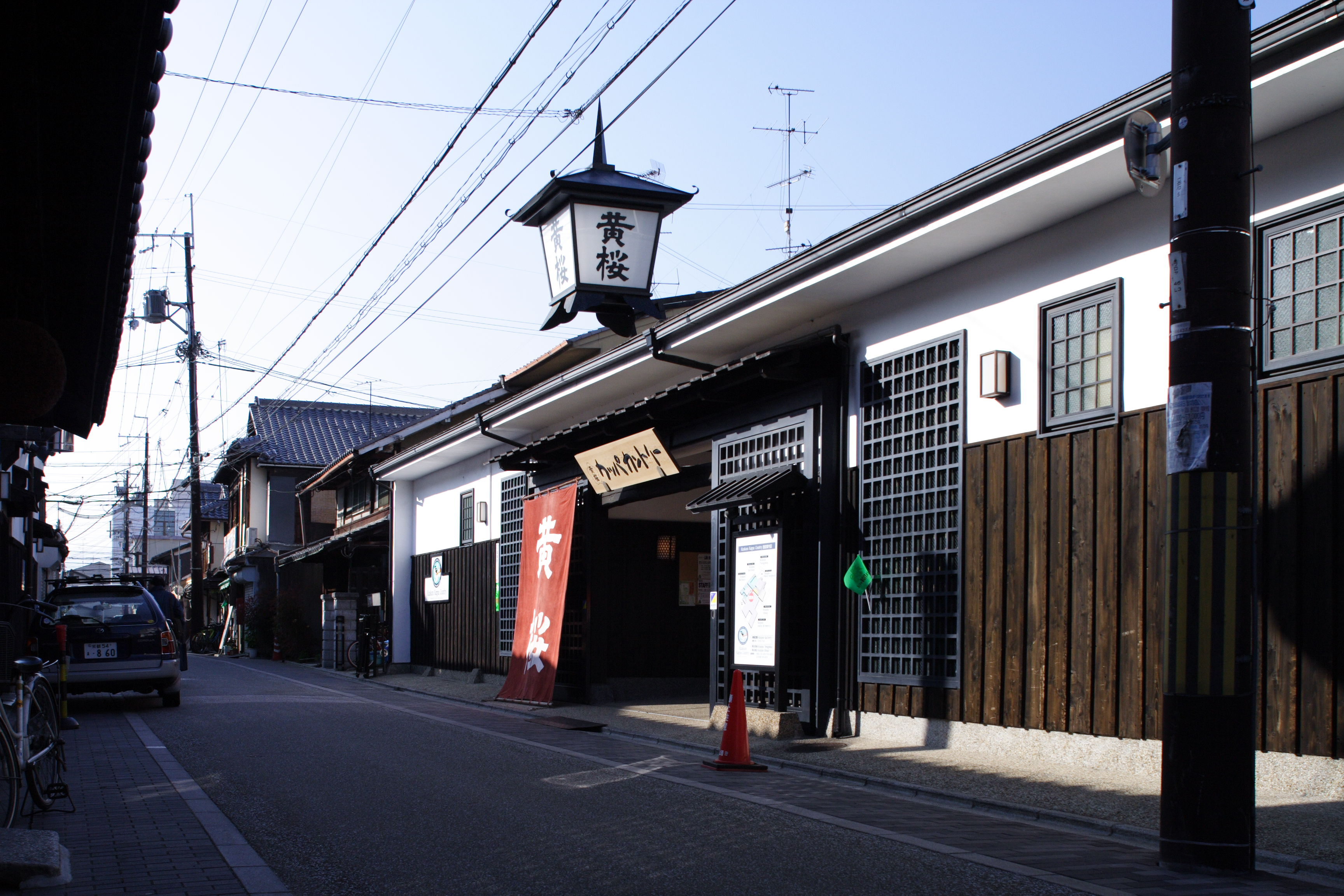 キザクラカッパカントリー 京都市伏見区/Kizakura Kappa Country Fushimi Kyoto Japan